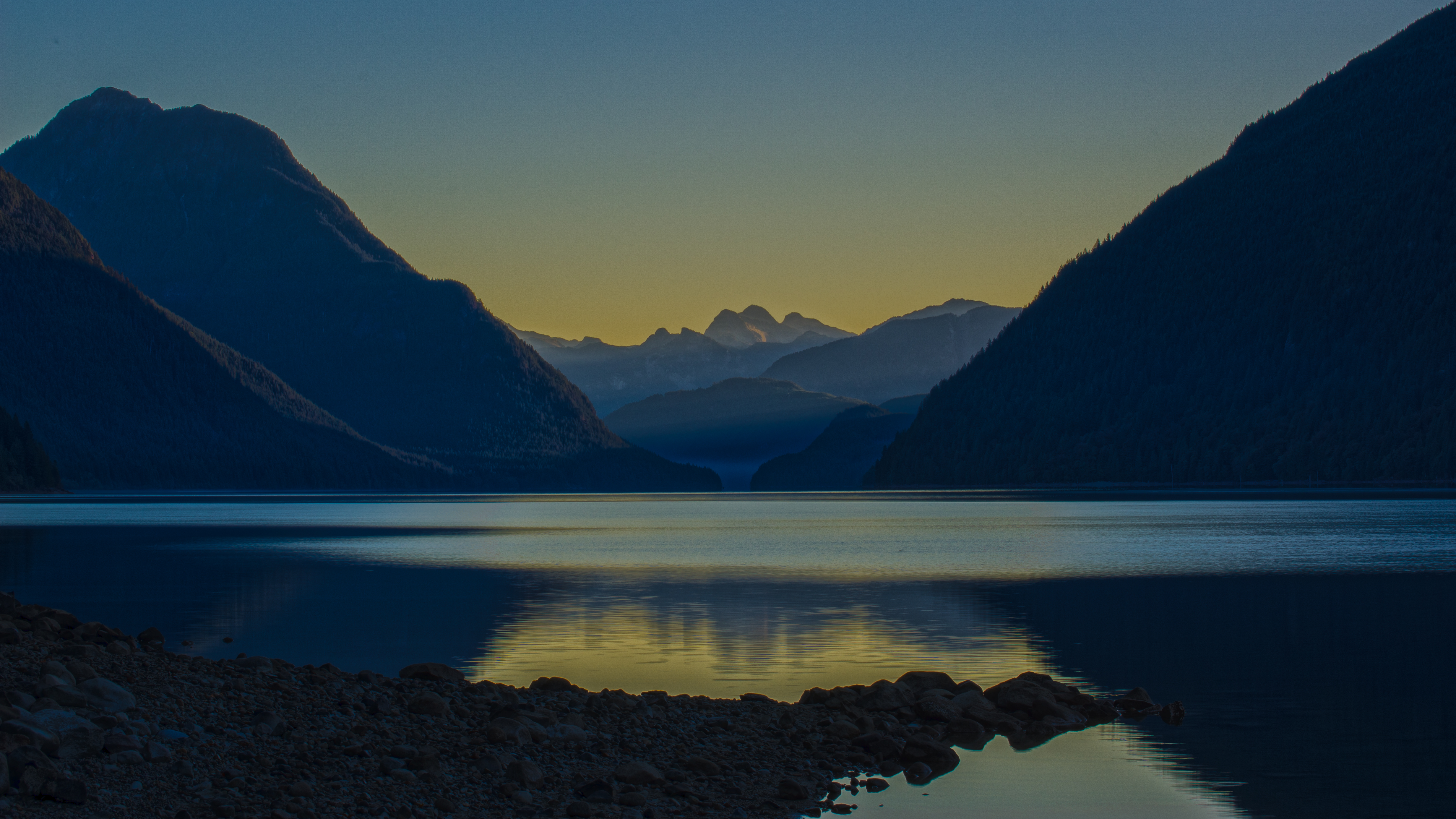 Alouette Lake at Sunrise